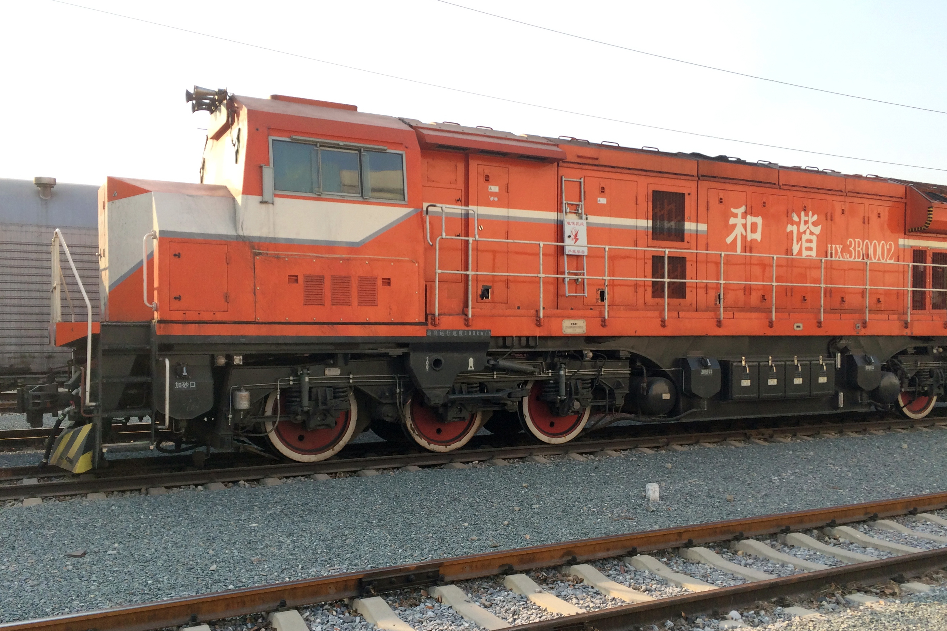 中文（香港）: 這是HXN3B於北京環鐵試驗時所拍